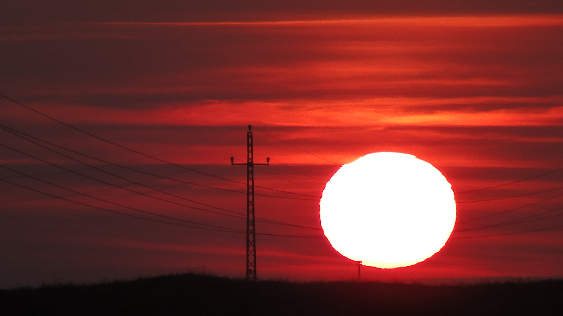 Cappados Turquie